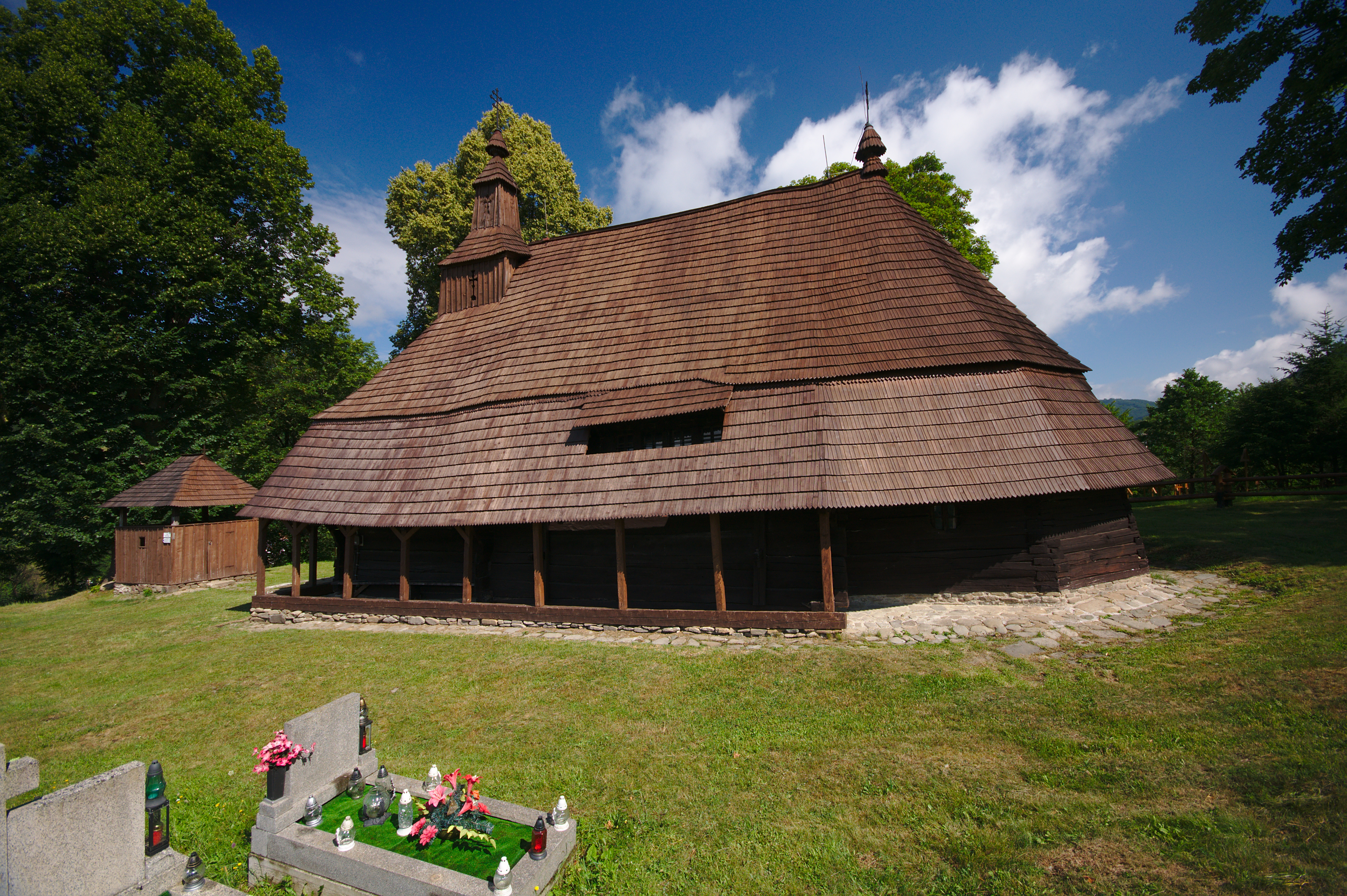 Cerkov svätého Michala archanjela, Topoľa, okres Snina